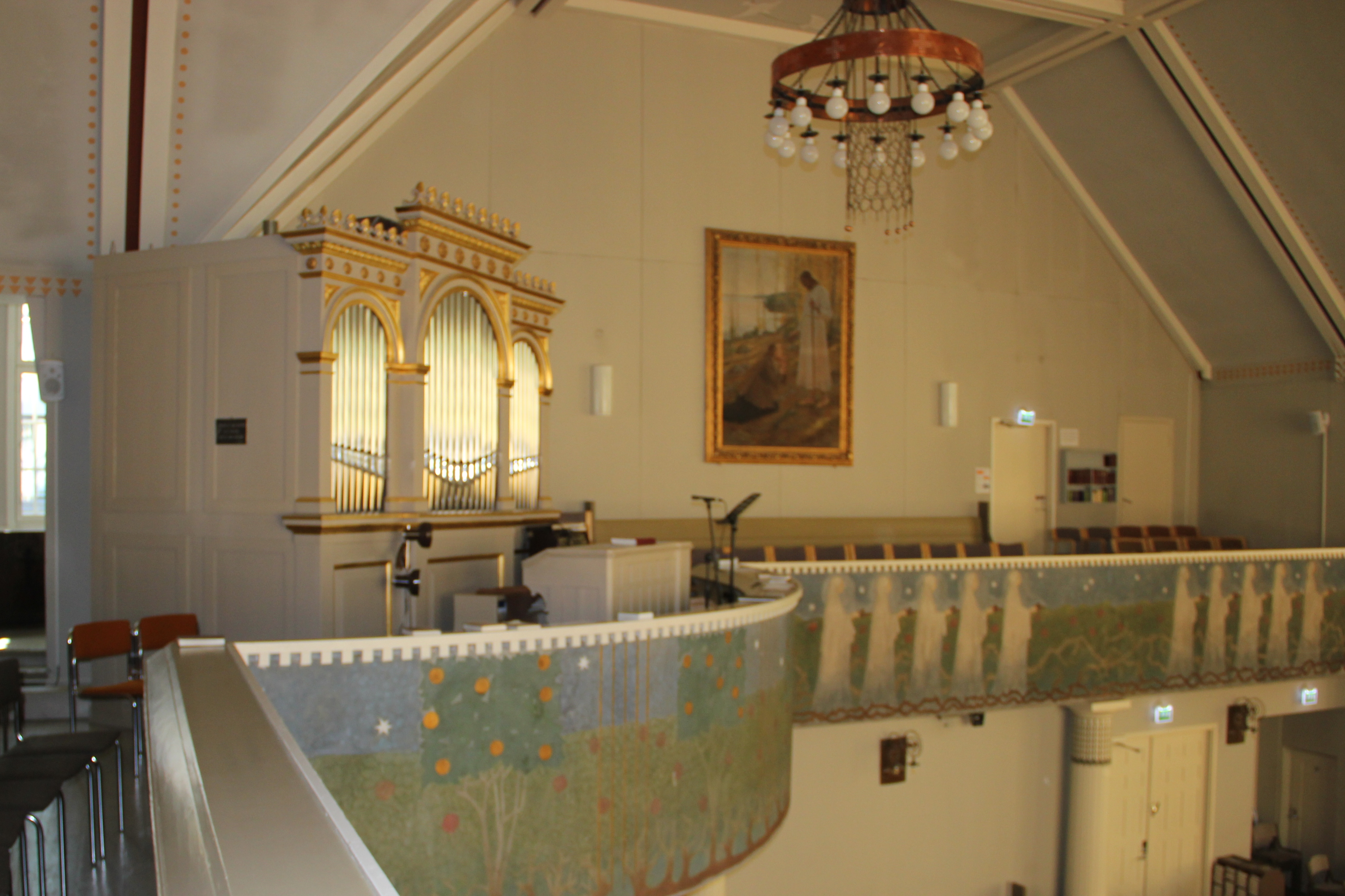 Pyhän sydämen kappeli, Kirstinkatu 1, Helsinki, omistaja Suomen Luterilainen Evankeliumiyhdistys (SLEY). Setterqvist-urut vuodelta 1890, hankittu Ruotsista ja asennettu paikalleen 1992.